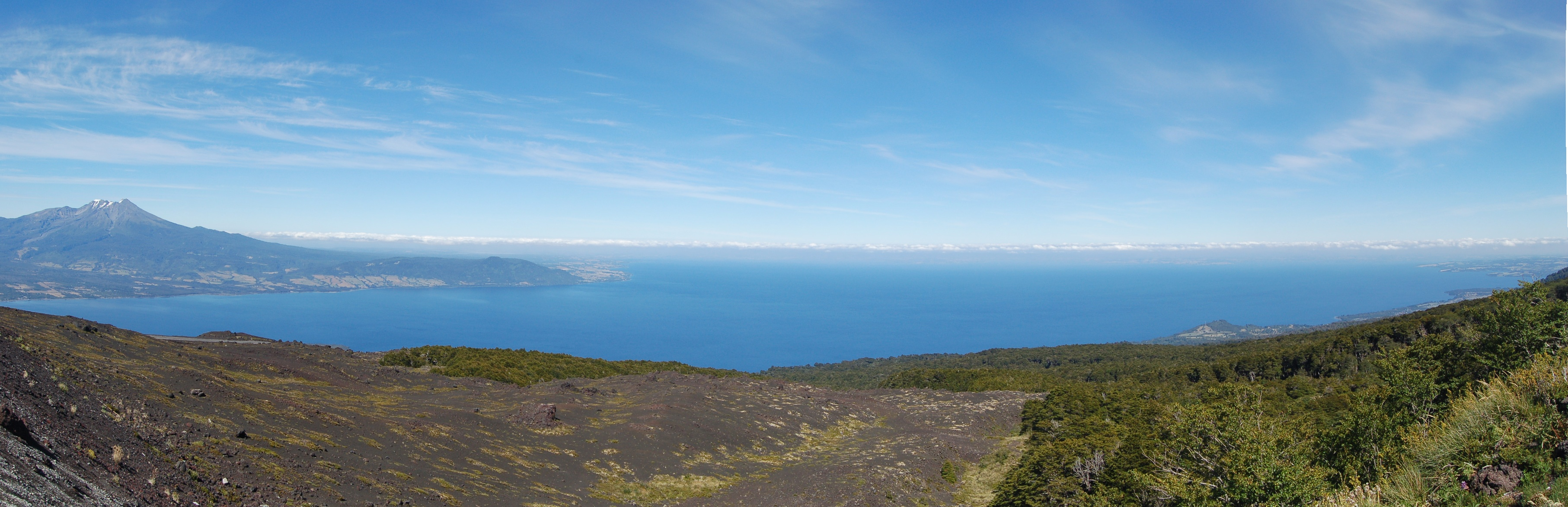 Lago Llanquihue 160° Panorama